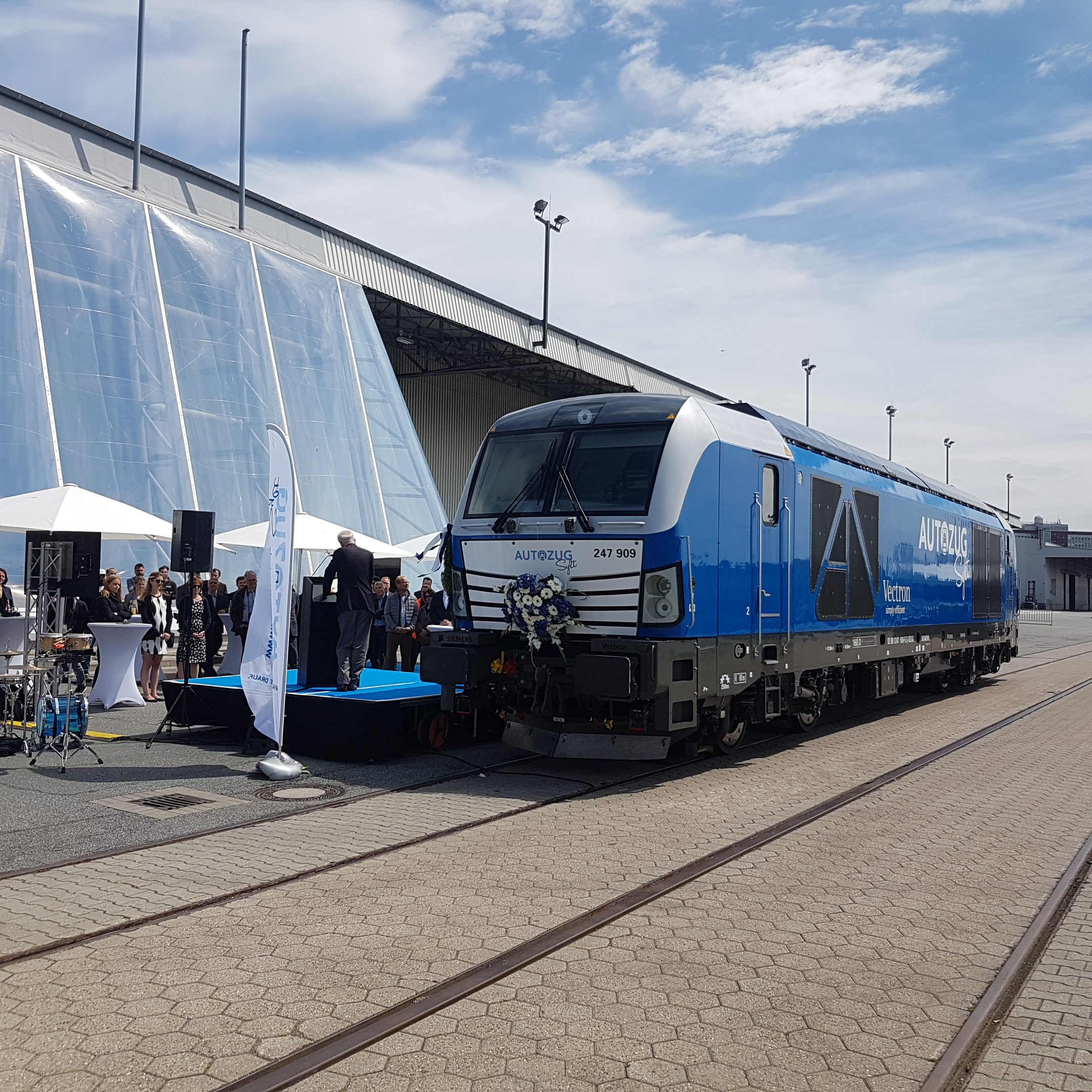 Loktaufe Vectron 247 909 im Kieler Ostuferhafen.